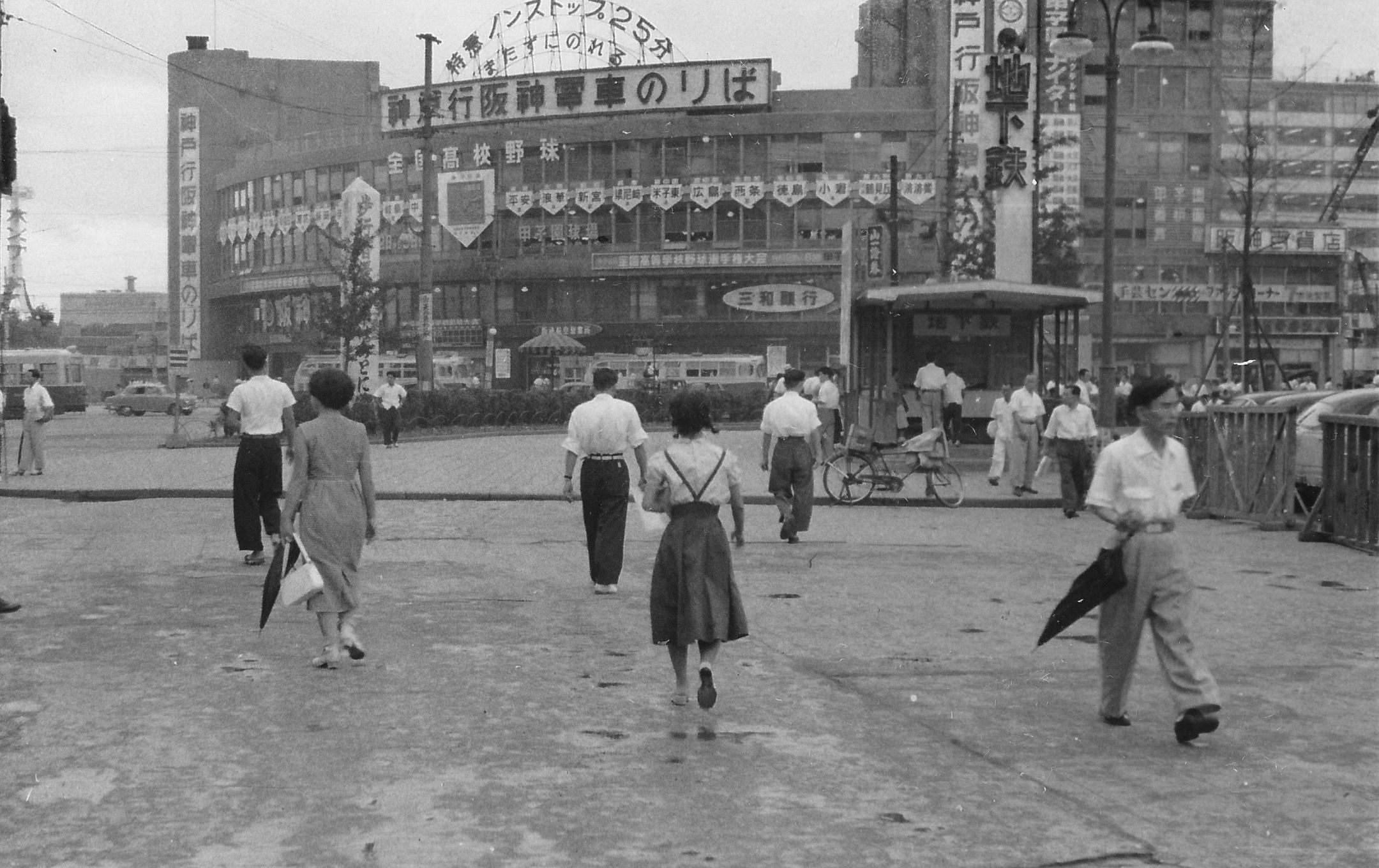 阪神大阪梅田駅（1931年）